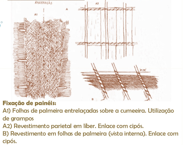 Formação de paines indigenas